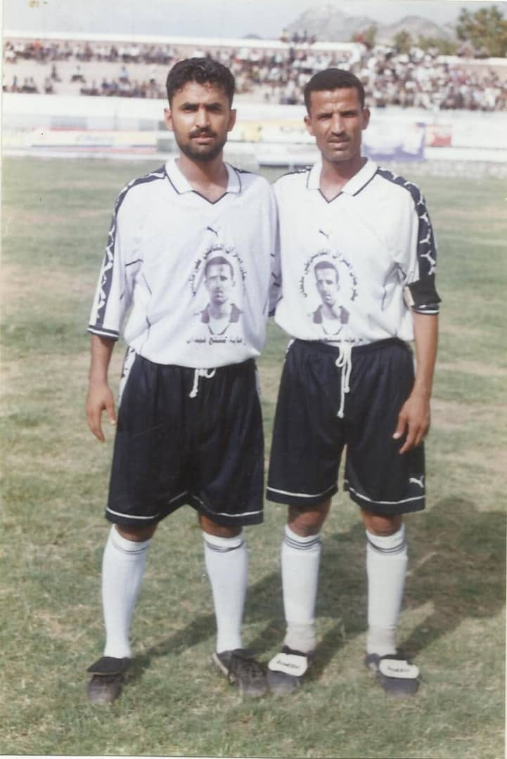 الكابتن اسعد المقطري والكابتن علي سلطان في يوم اعتزاله في ملعب الشهداء بتعز عام 2002